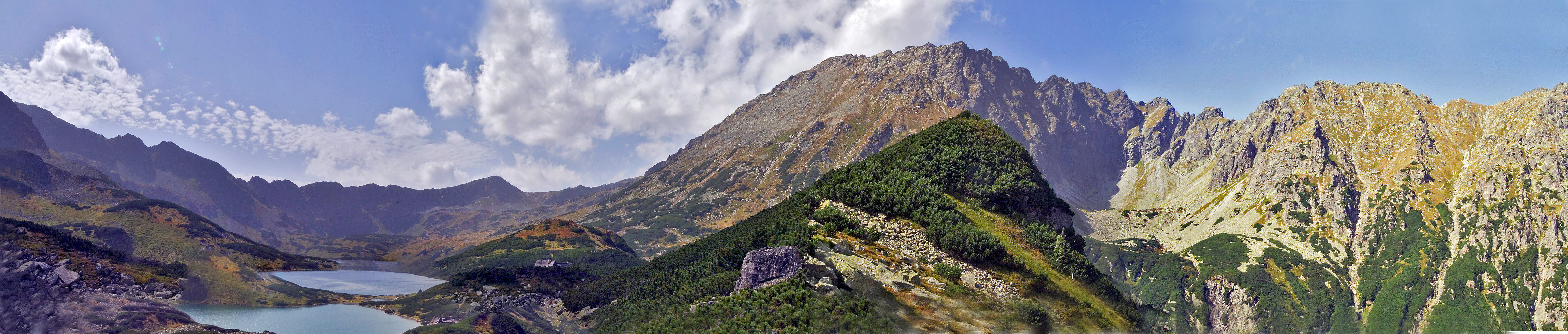 Widok na Dolinę Pięciu Stawów ze szlaku do Morskiego Oka przez Świstówkę